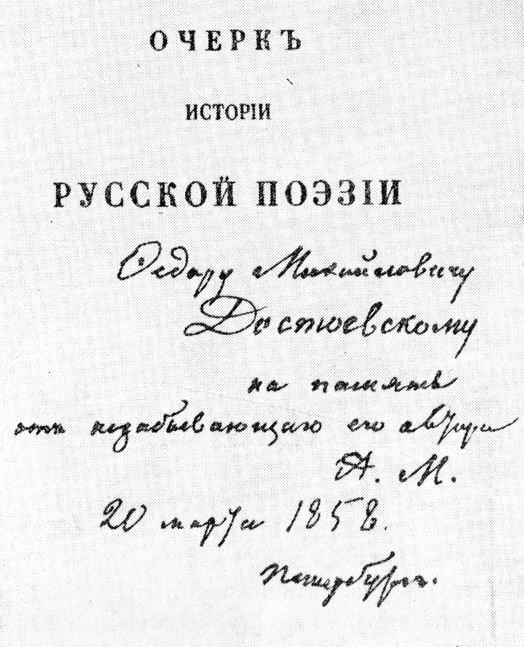 Дарственная надпись А. П. Милюкова Ф. М. Достоевскому на книге "Очерк истории русской поэзии", 1858